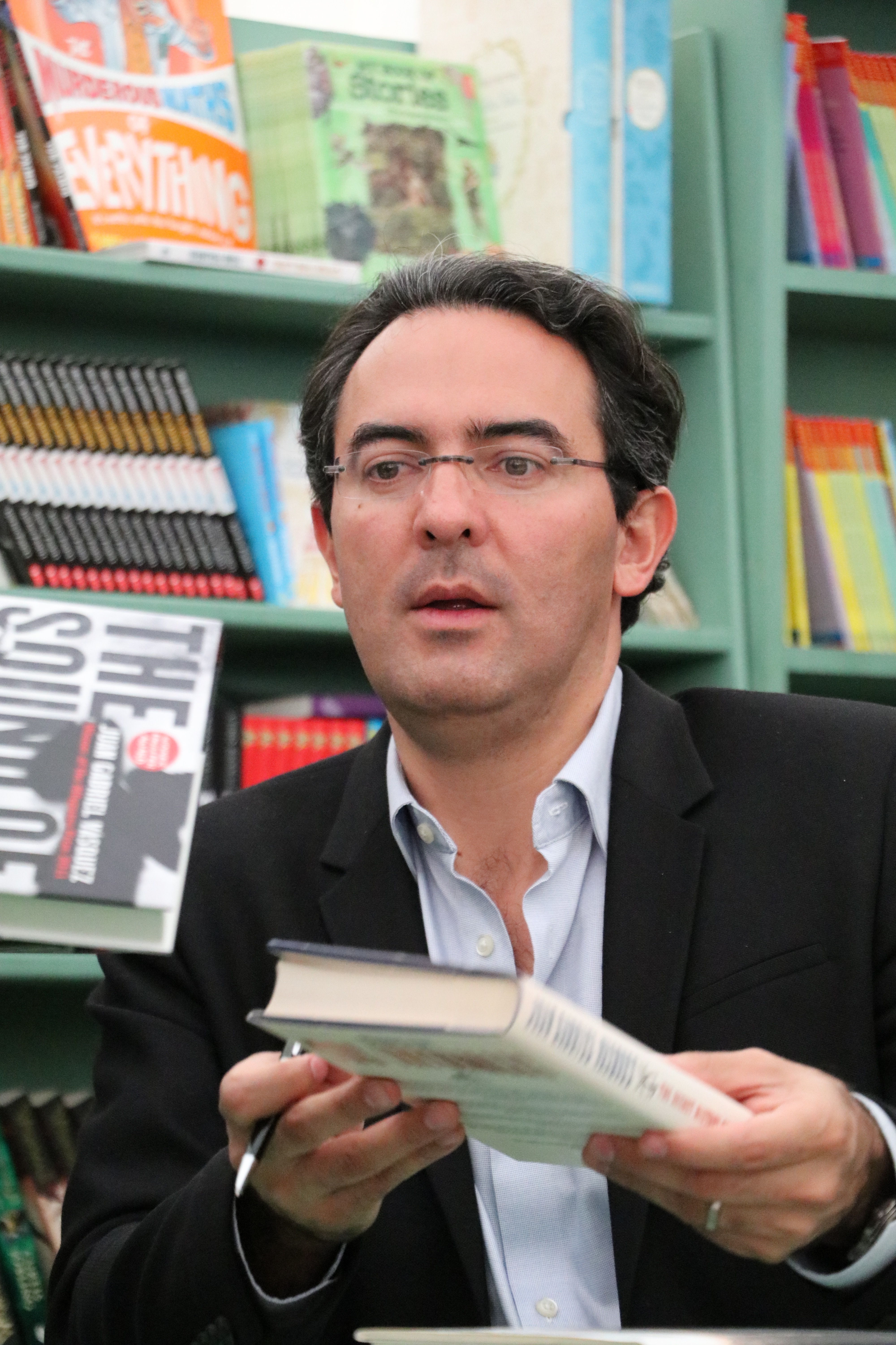 Juan Gabriel Vásquez en el Hay Festival 2016